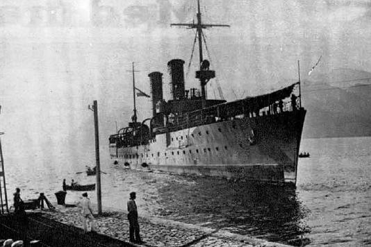 Križarka Dalmacija